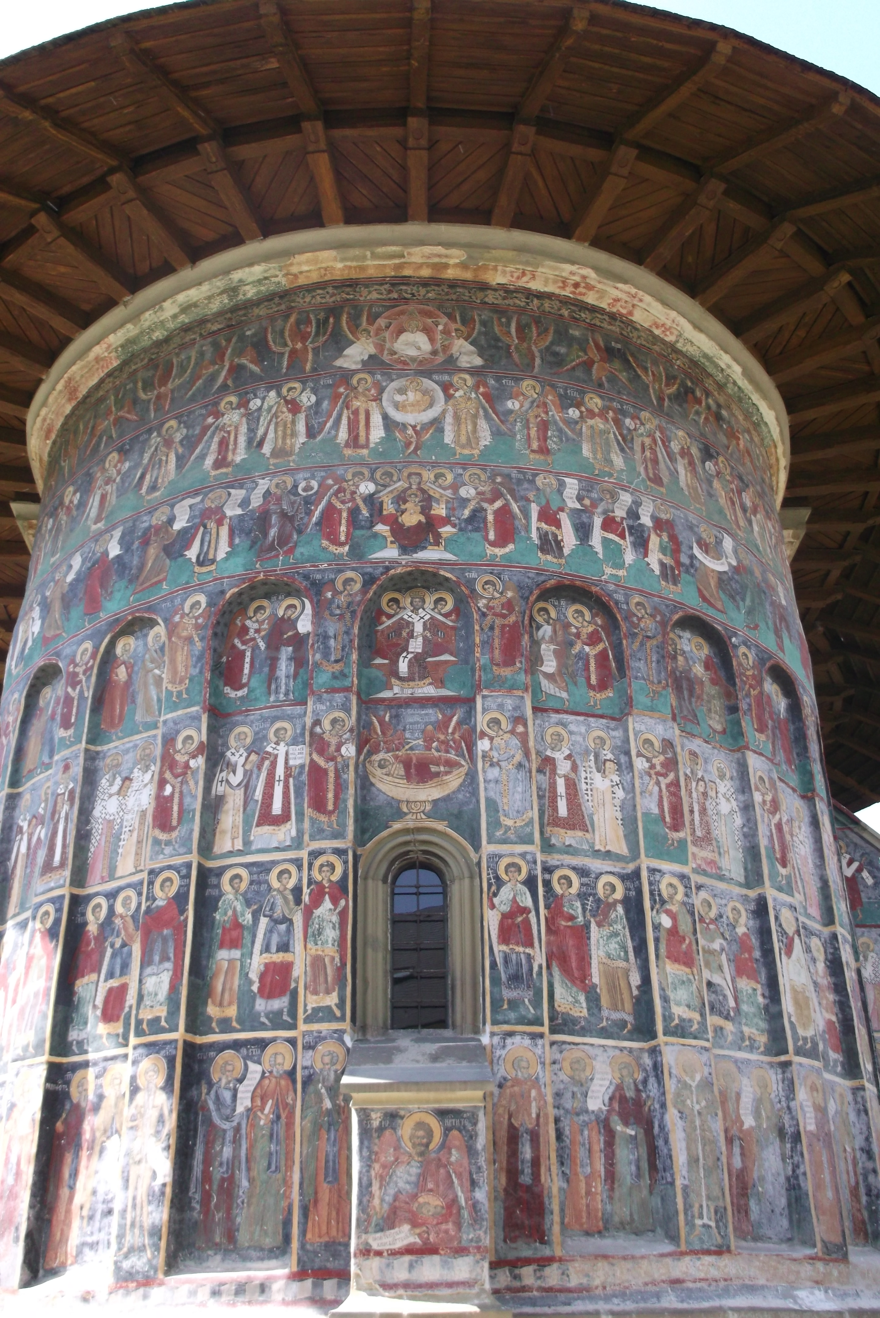 Suczawica (Sucevita), monastyr, cerkiew Zmartwychwstania